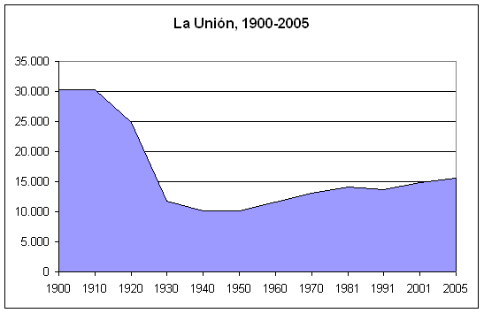 La Unión's population, Murcia, Spain, (1900-2005). Own work, given to PD. Source: Instituto Nacional de Estadística.